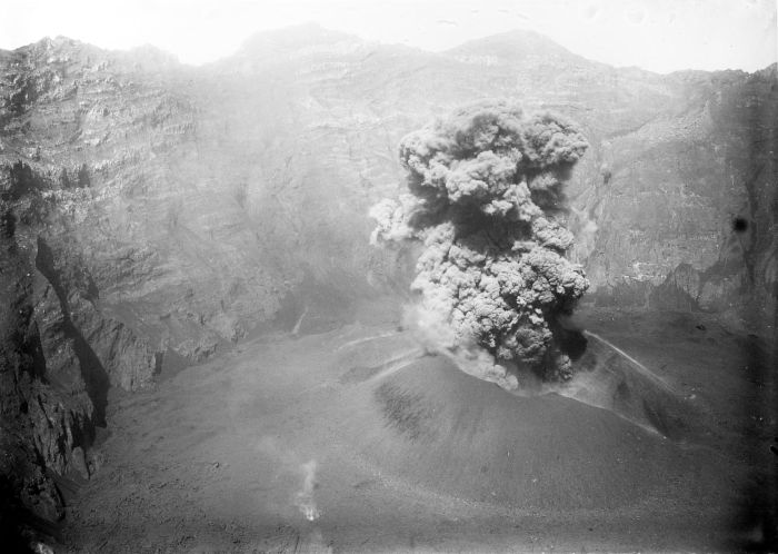 Lichtbeeld. Eruptie van de vulkaan Raung, Ijen-plateau